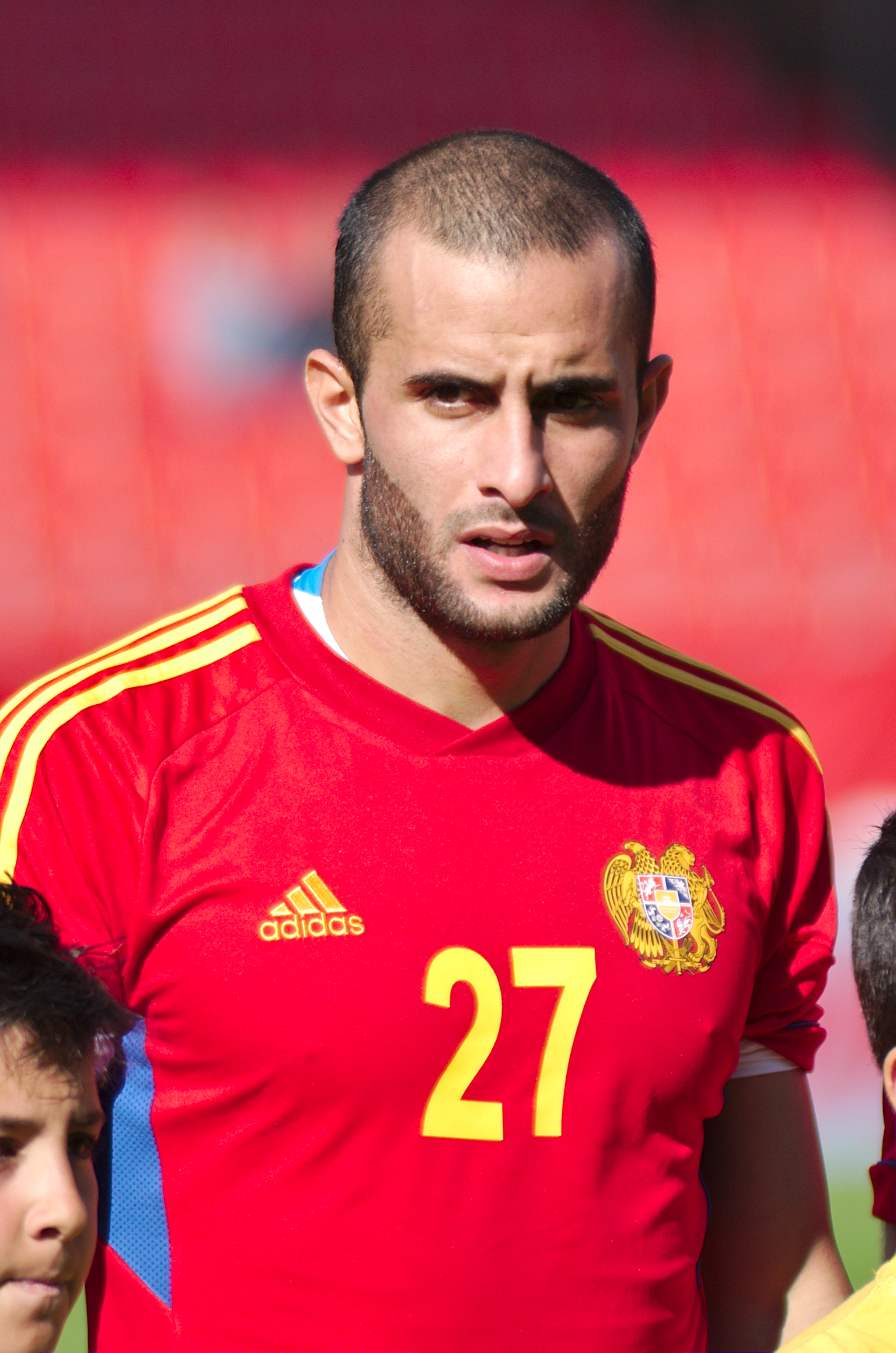 Algérie - Arménie - 20140531 - Mauro Guevgeozian